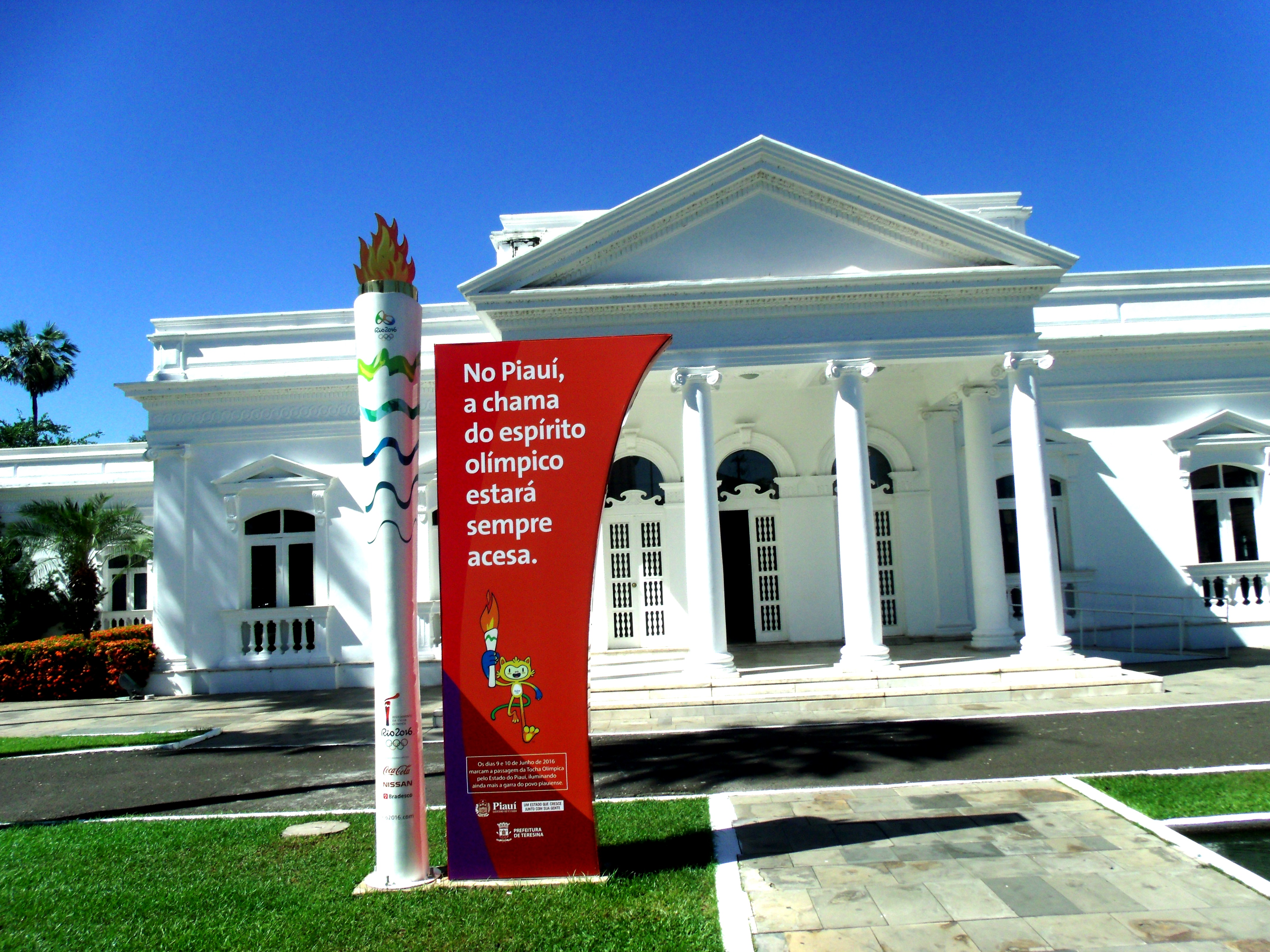 Monumento da tocha olímpica nos jardins do palácio de Karnak, sede do governo do estado do Piauí. Em alusão ao Revezamento da Tocha dos Jogos Olímpicos de Verão de 2016.